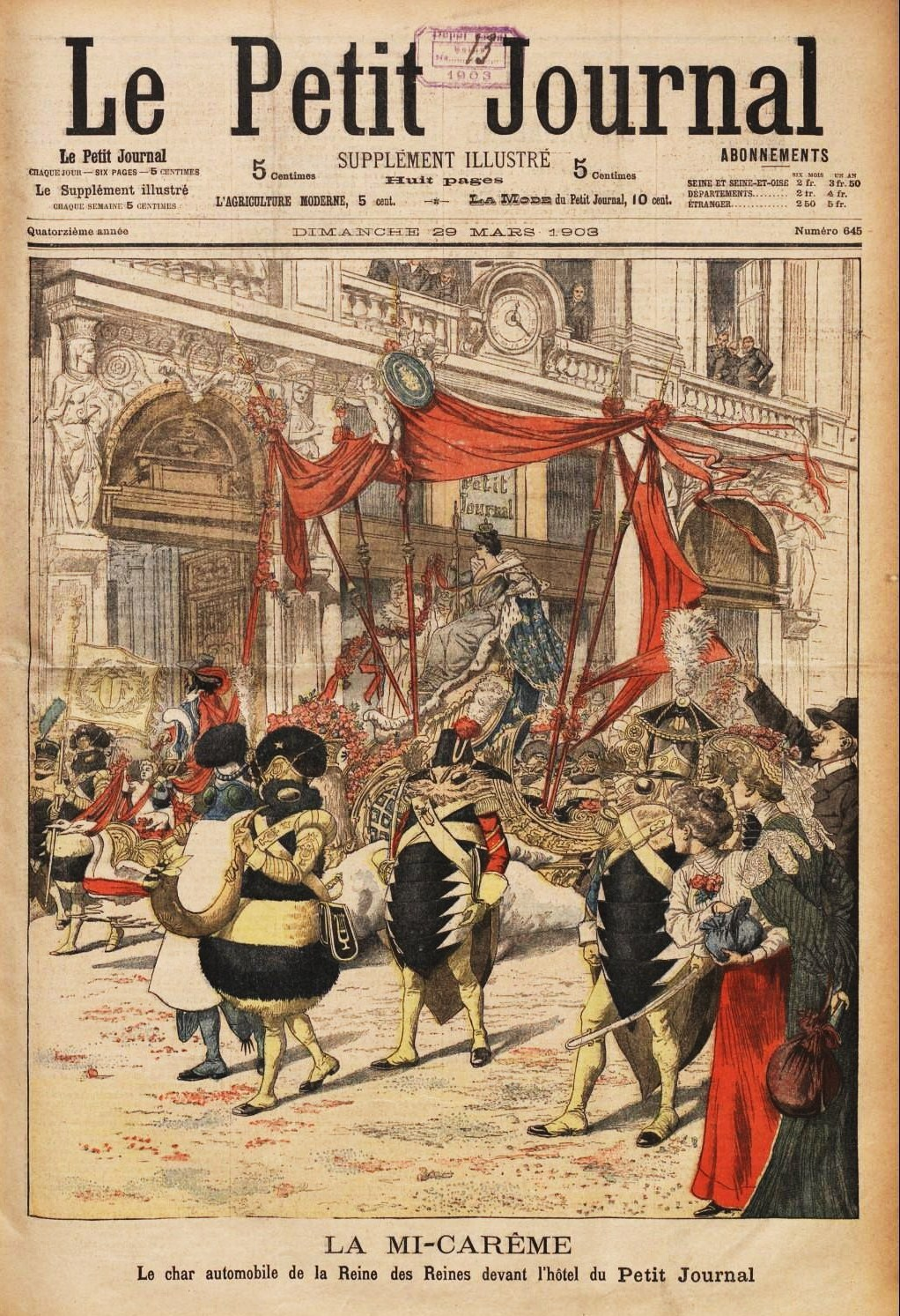 Le char automobile électrique de Marie Missiaux Reine des Reines de Paris 1903 pour la rive droite et le cortège de la Mi-Carême devant le siège parisien du Petit journal. Au premier plan à droite, des lanceurs de confettis.